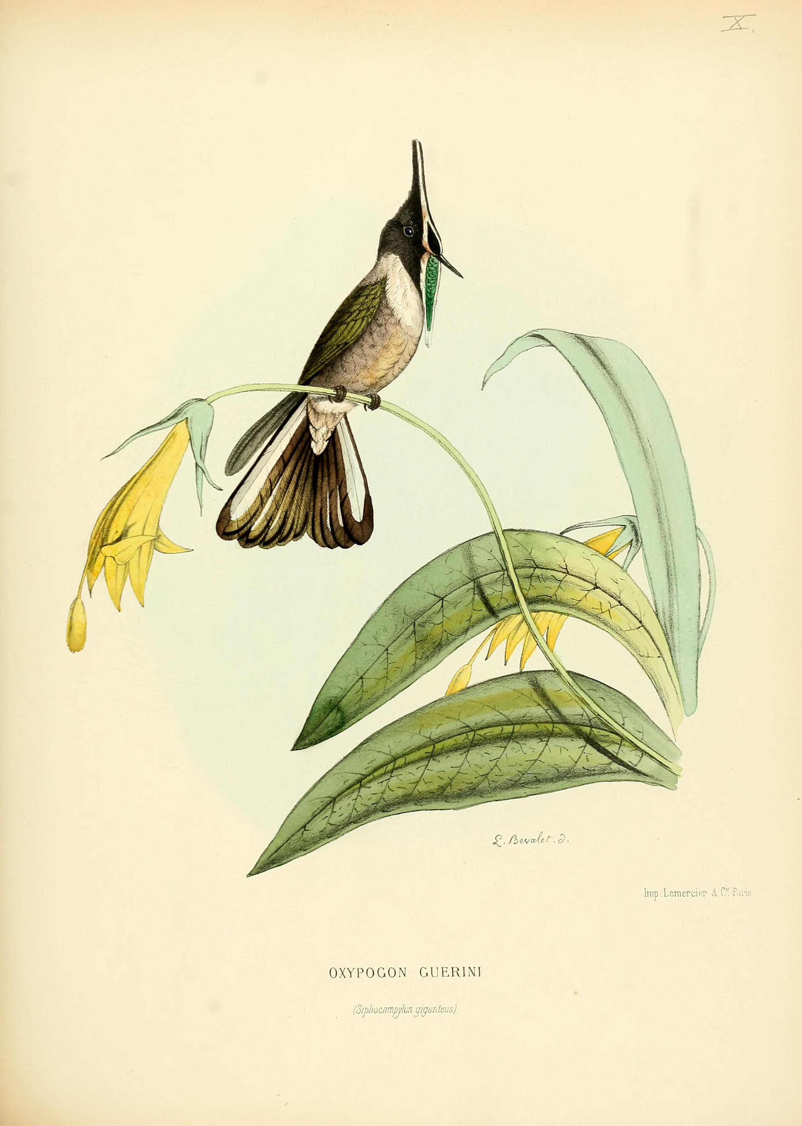 Oxypogon guerinii